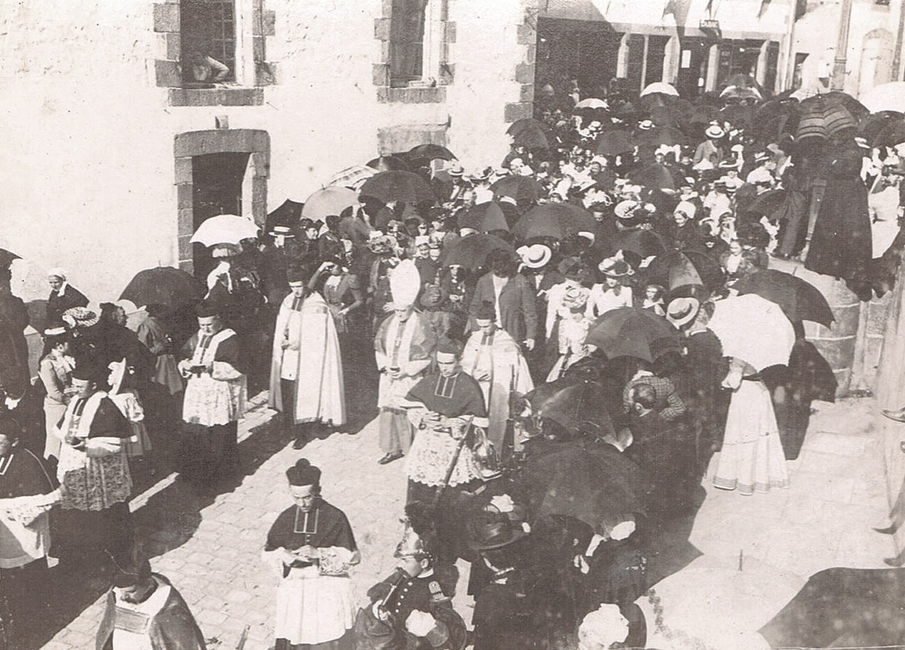 Procession du 15 août à Saint-Servan-sur-Mer ( Saint-Malo), avec le protonotaire apostolique Louis Duchesne (1843-1922) chapeauté de sa mitre, photographie de Paul Miniac (1851-1936).